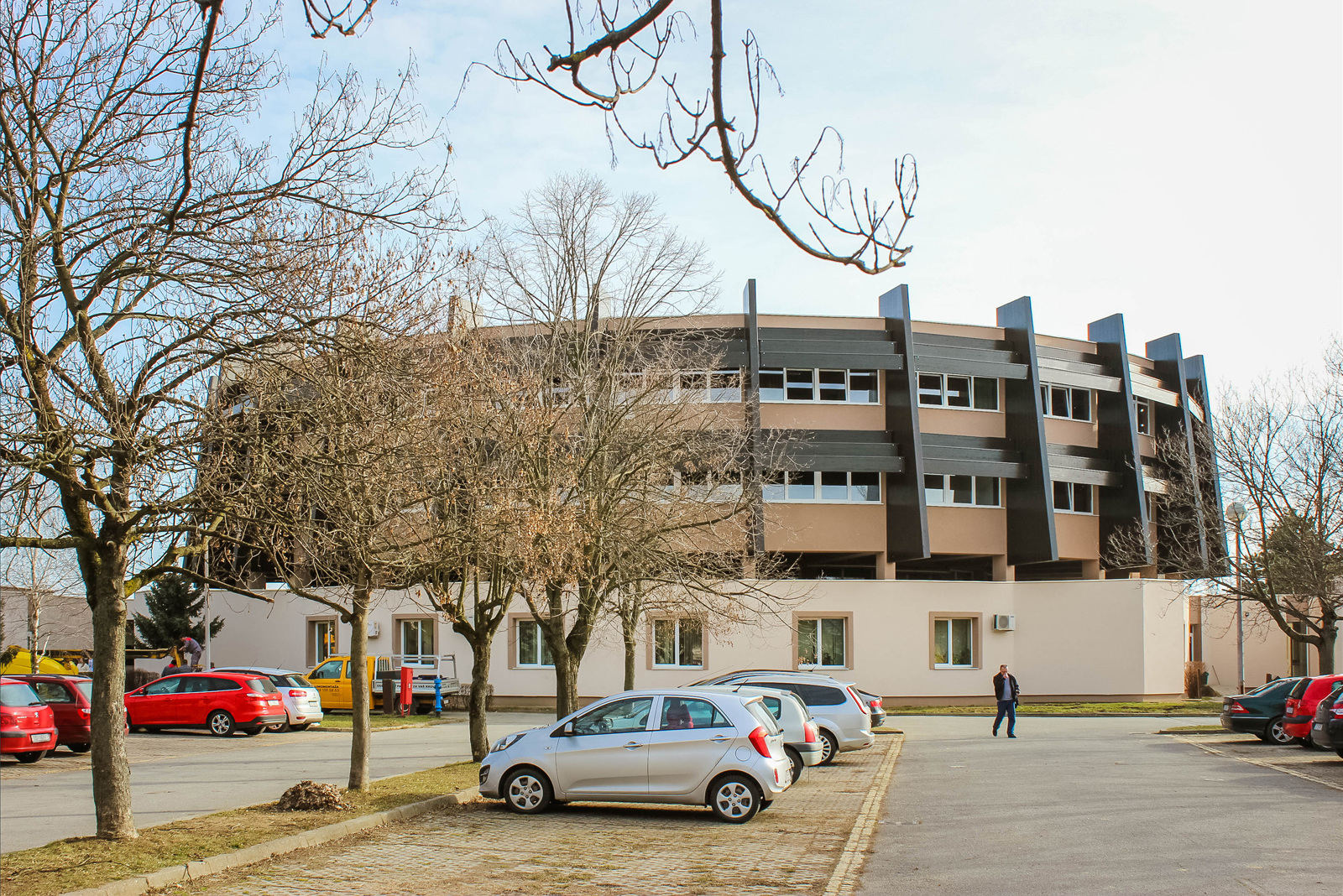 Građevinska i geodetska škola Osijek